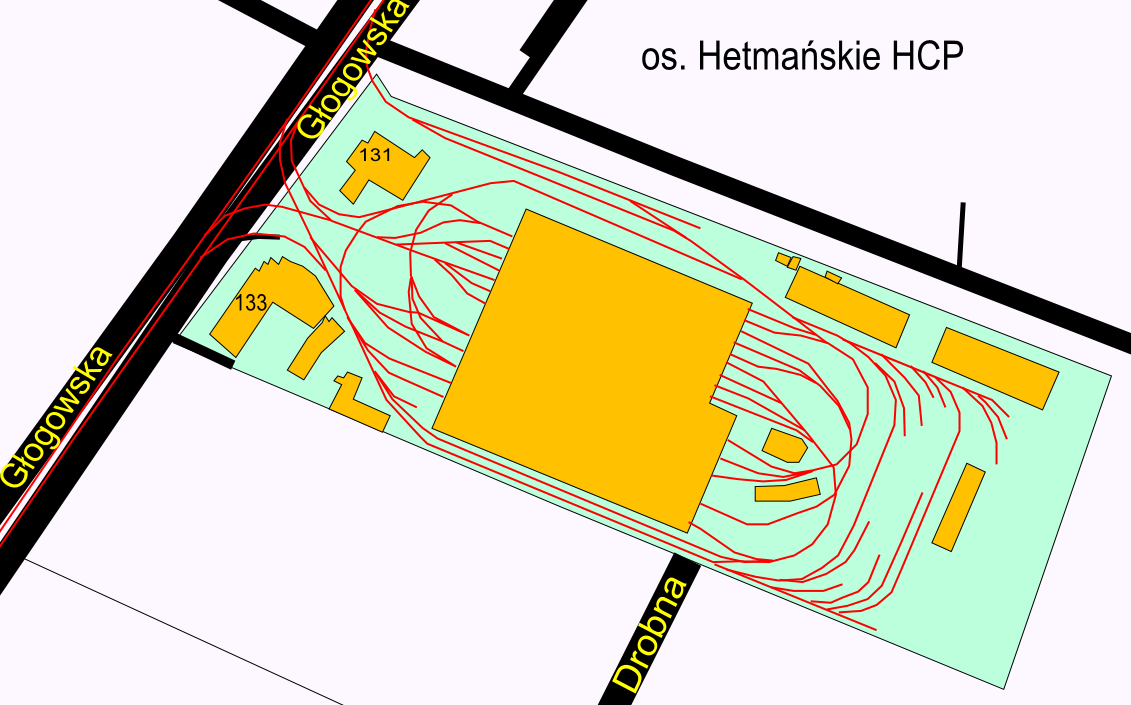 Zajezdnia S1 - Głogowska Poznań